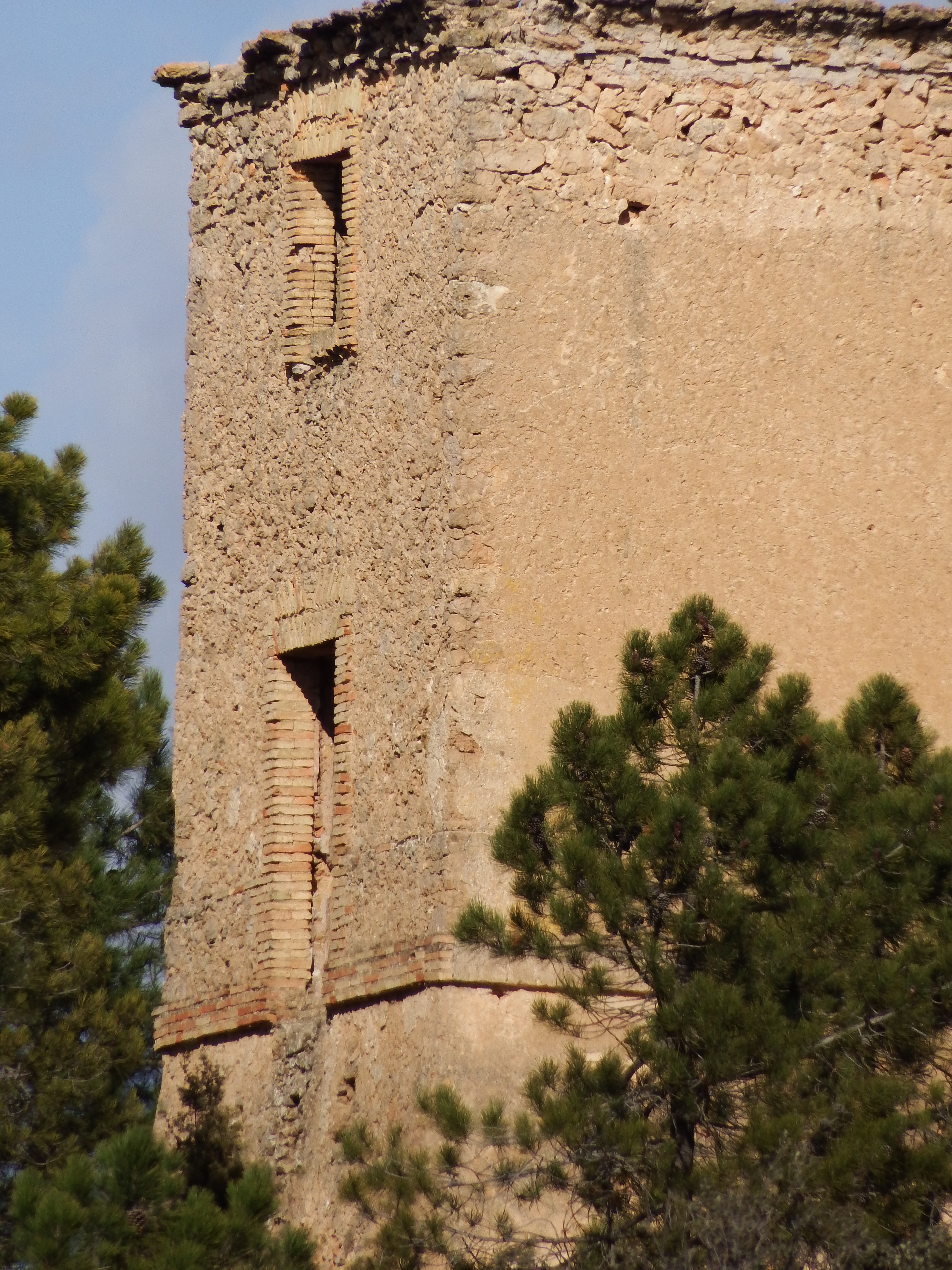 Torre de telegrafia óptica de Graja de Iniesta